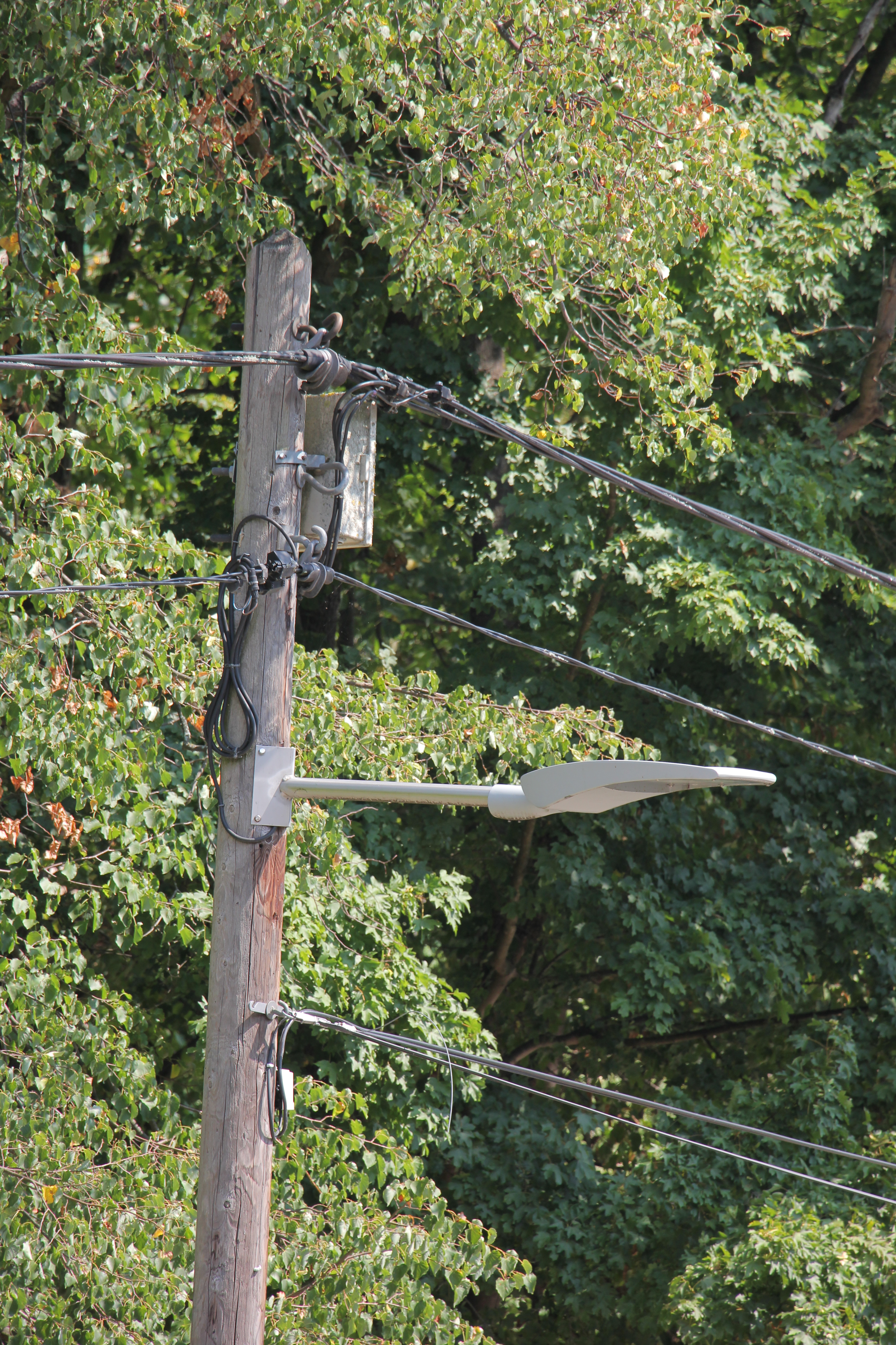 Mastkopf eines Holzmastes der Wiener Netze in NÖ mit der 400 V Haushaltsversorgung, zusätzlich ist die Straßenbeleuchtung mit ihrer eigenen Stromversorgung, sowie die Telefonleitung am Mast geführt (errichtet in den 1980er Jahren)